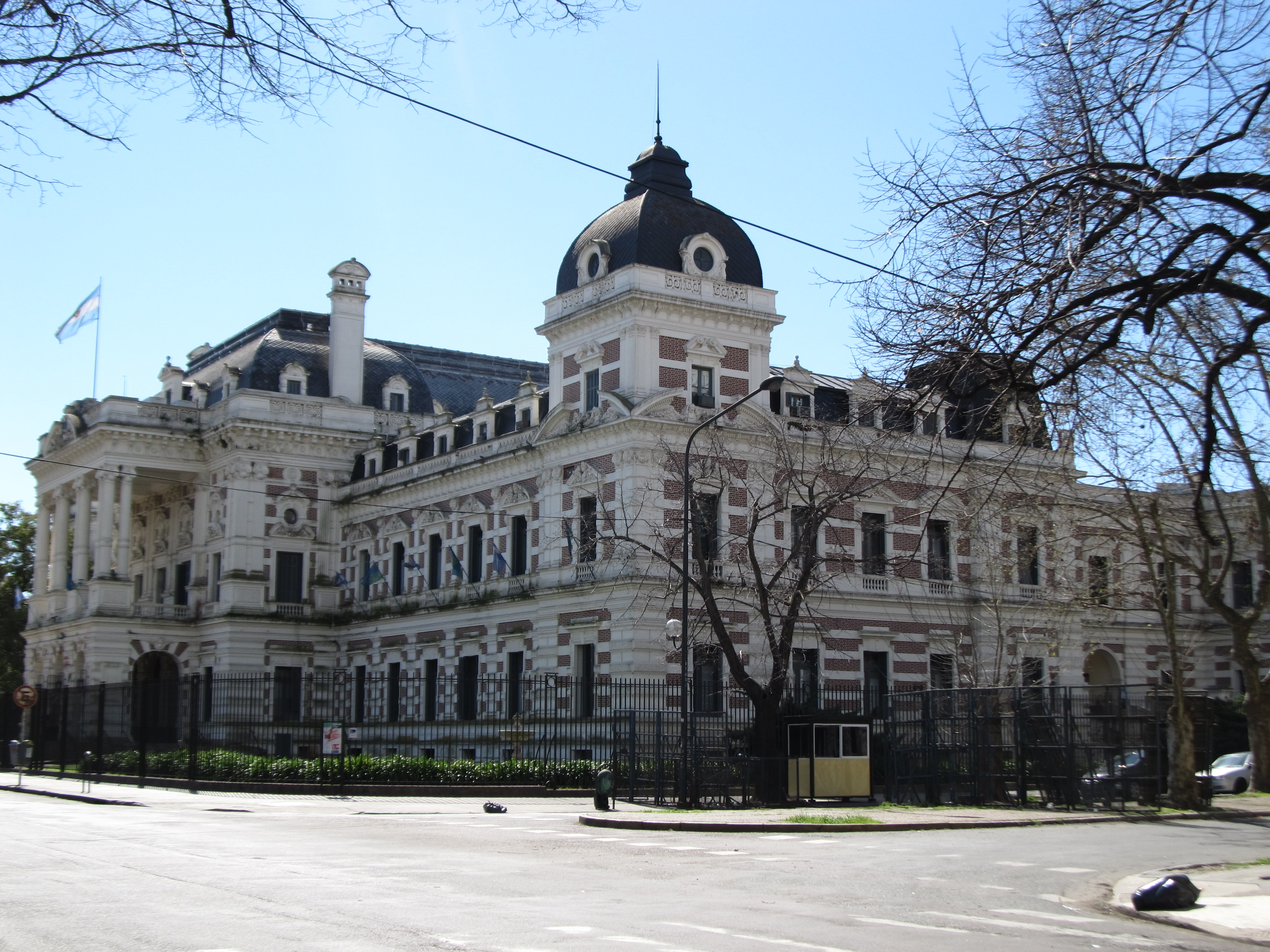 Casa de Gobierno de Buenos Aires y Residencia del Gobernador